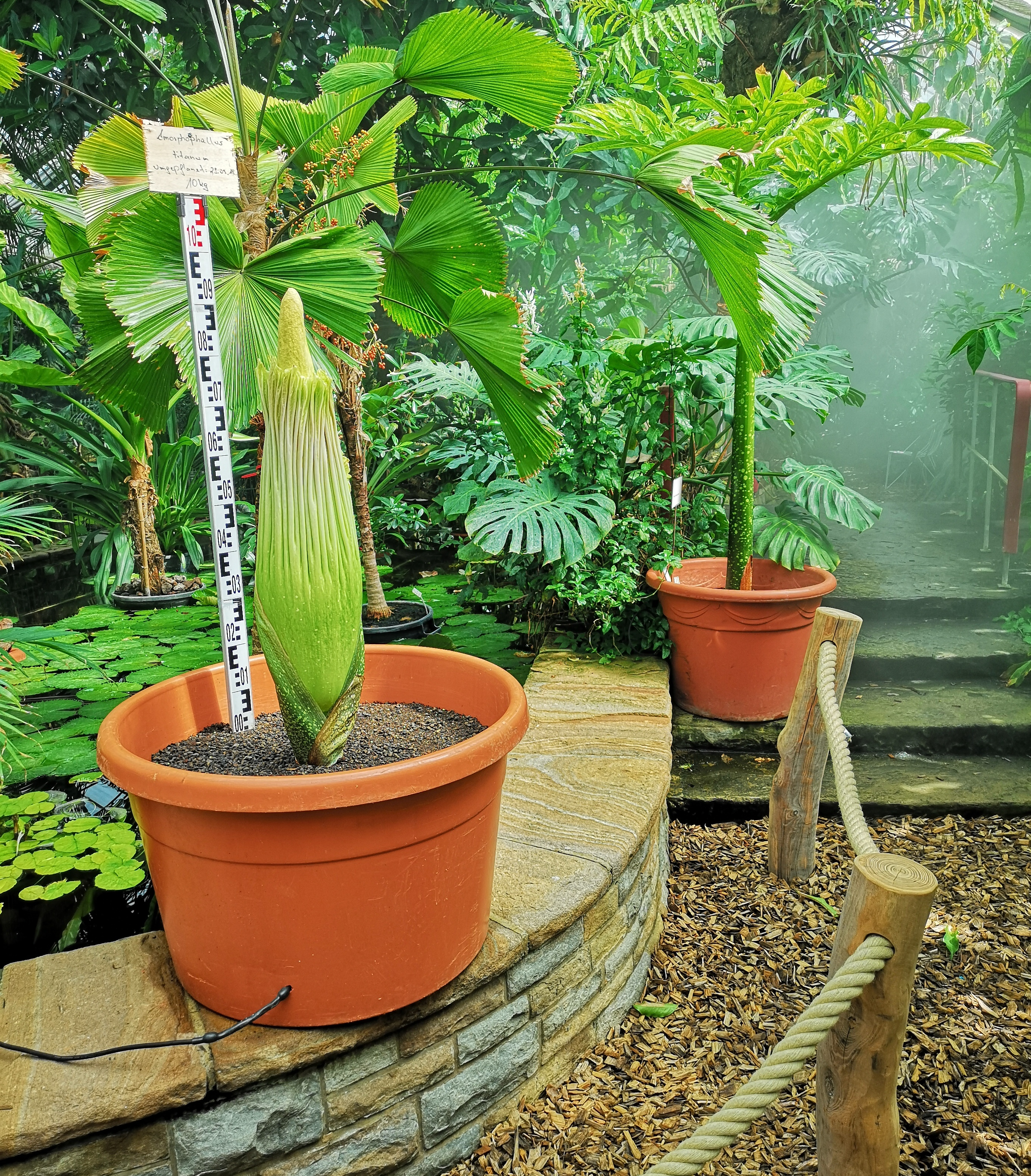 Titanenwurz am 10. August 2018. Unten links ist das Kabel des Heizkörpers für die konstante Temperaturregulung während der kälteren Tagesphasen zu sehen; oben rechts der aktiviere Sprühnebel für die landestypische Feuchte.